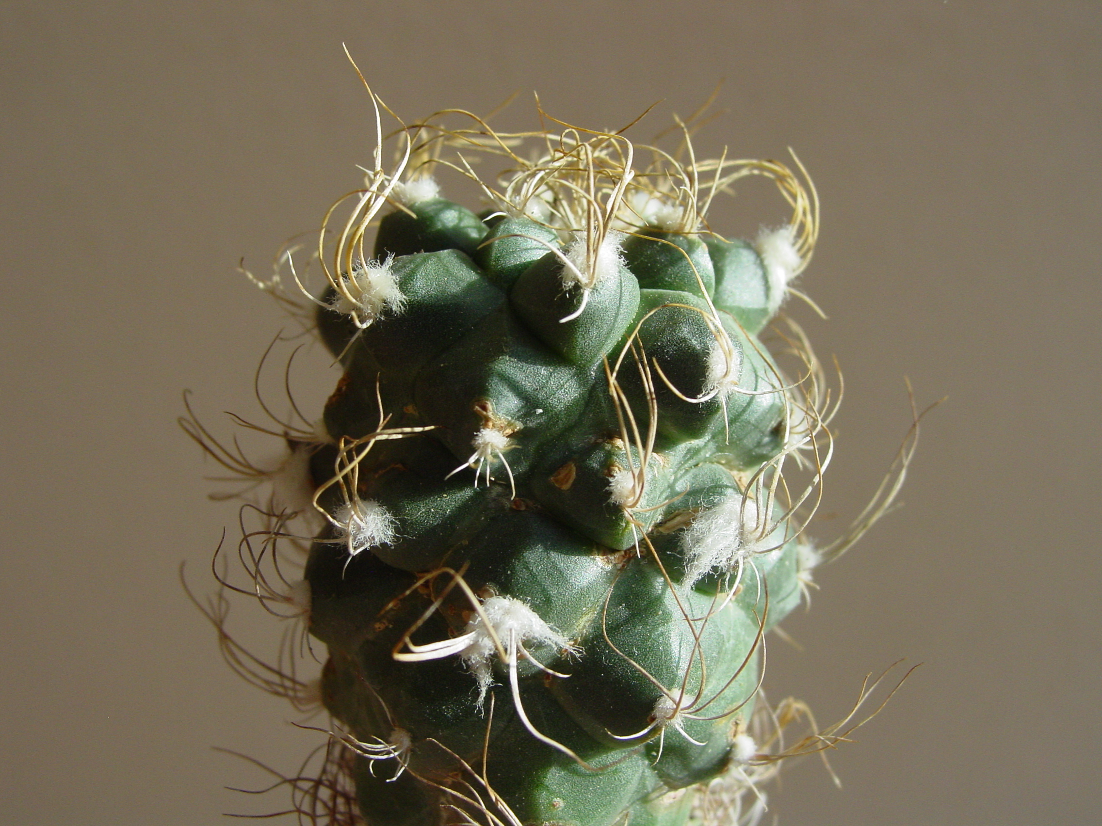 Turbinicarpus pseudomacrochele spada v družino kaktusov rodu Tubinicarpus.